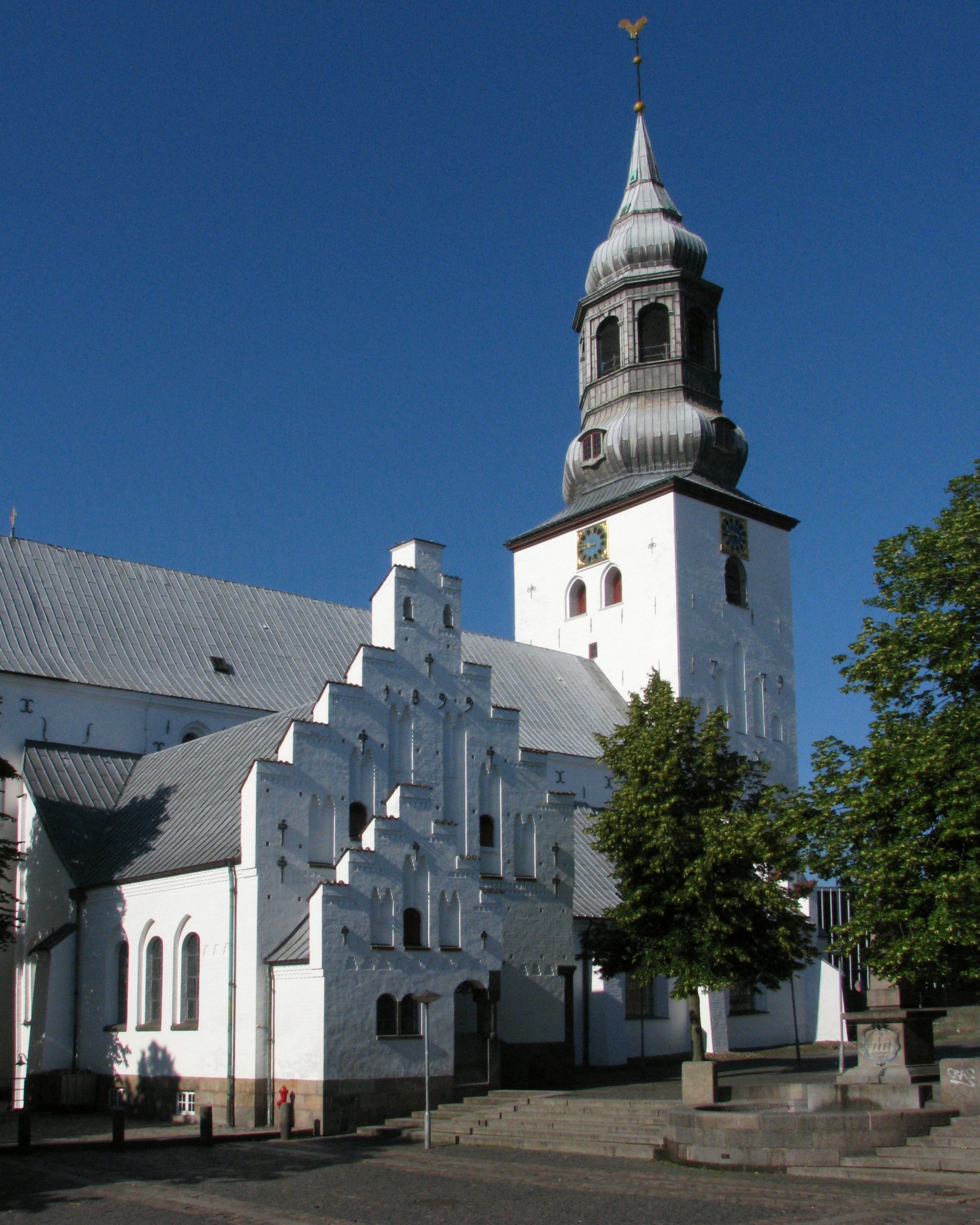 Aalborg Danmark Sct Budolfi Kirke er Aalborgs domkirke Foto 2010 Wolfgang Pehlemann Steinberg Ostsee IMG_6659